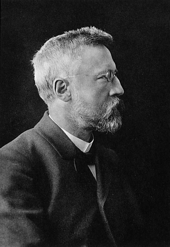 Rudolf Smend (1851-1913), deutscher evangelischer Theologe